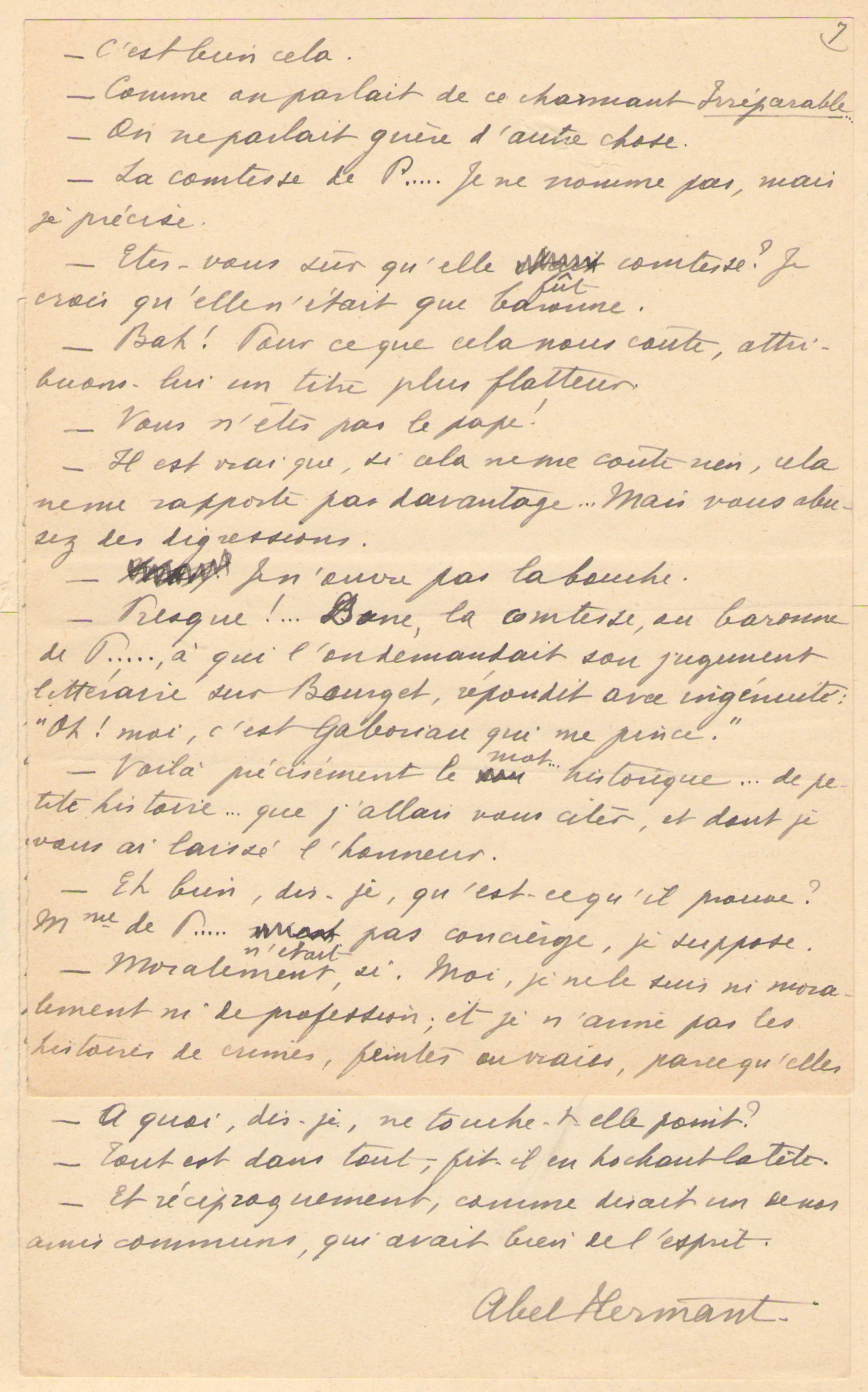 Manuscrit original